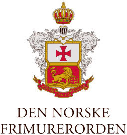 Våpenskjoldet som brukes som logo for Den Norske Frimurerorden